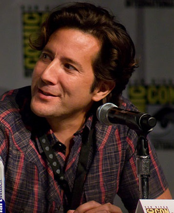 Henry Ian Cusick en 2013.